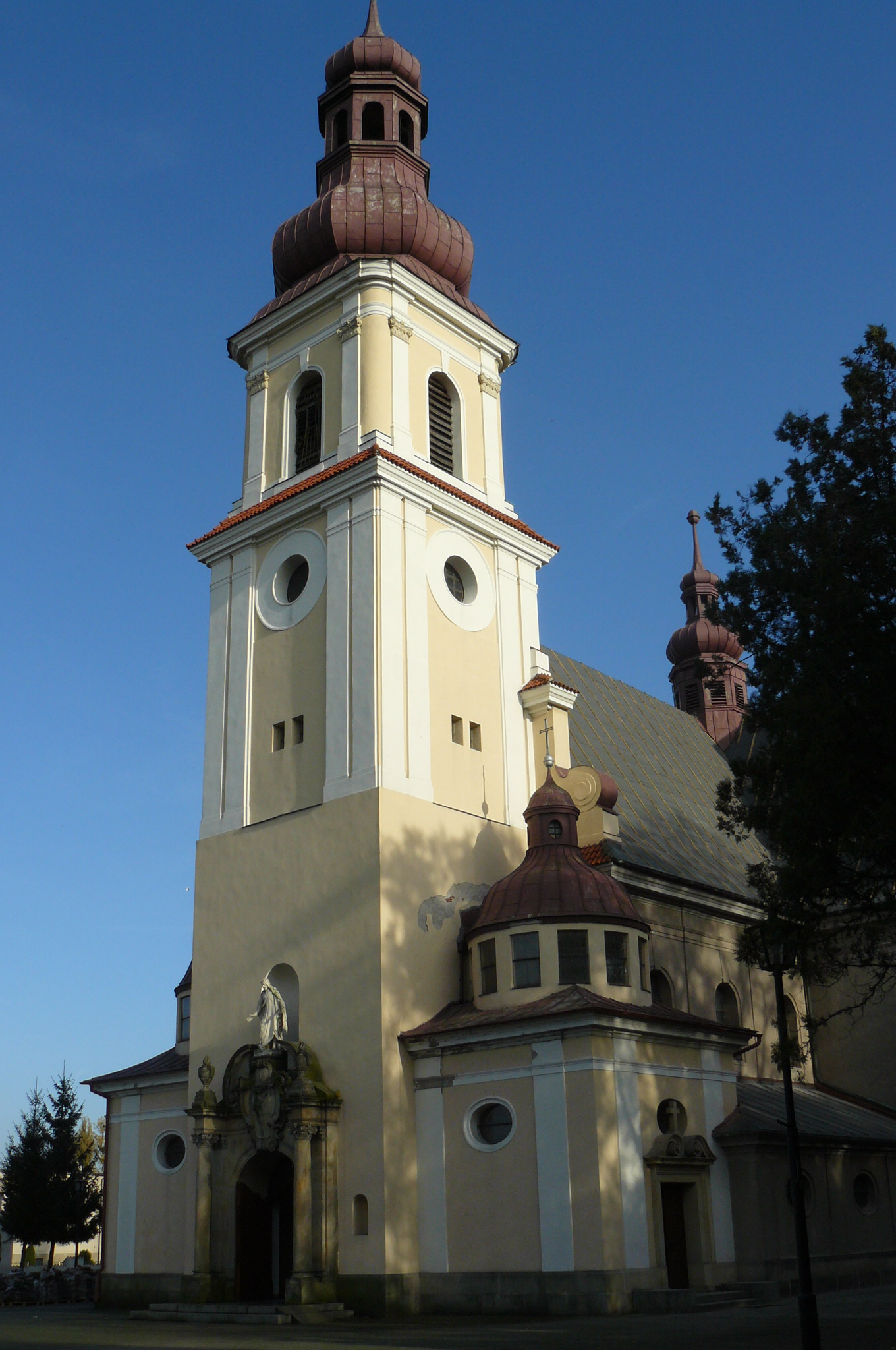 Kościół neobarokowy w Smolicach wraz z cmentarzem i otoczeniem.